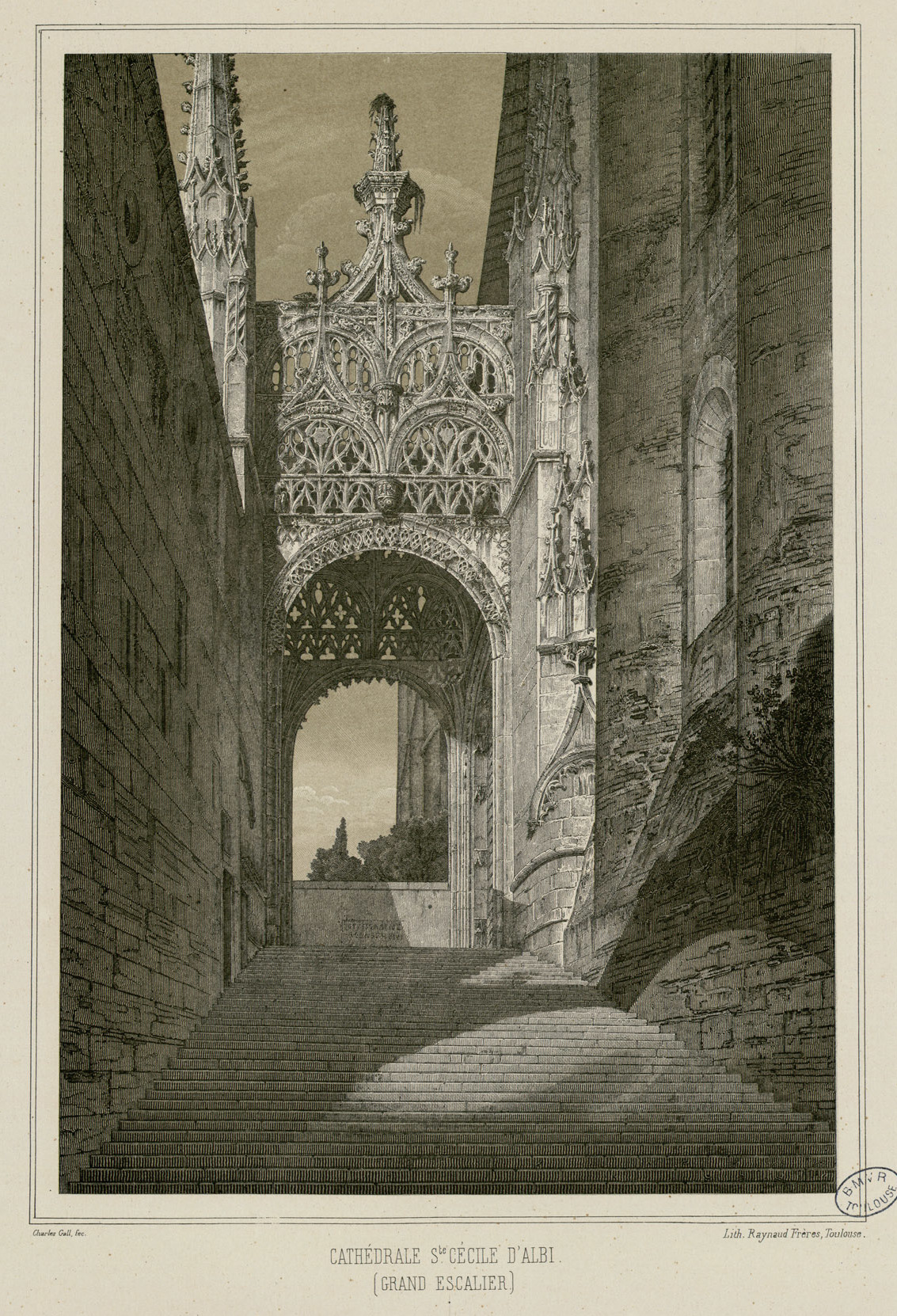 Texte incomplet des dernières pages. La plupart des lithographies ont été tirées par les ateliers de Raynaud frères, d'après A. Du Mège. Quelques unes ont été dessinées et lithographiées par Charles Gall, Bonnet, E. Binet, Durand, M. Pomier, P. Lacour, G. Chariol, Les planches sont numérotées mais plusieurs manquent sur les 49 annoncées (pl. 1, 6, 13, 18, 21,22, 23, 24, 25, 26, 27, 28, 30, 31, 32, 33, 38, 40, ...) : il semblent que ces planches n'aient jamais été publiées (voir note p. 9 du texte). - Les 4 dernières planches sont extraites du tome II de l'Atlas de l'Archéologie Pyrénéenne. Monuments mythologiques (pl. 1 à 6). Pièces jointes : couvertures papier de différentes livraisons Ancely, René (1876 - 1966). Possesseur